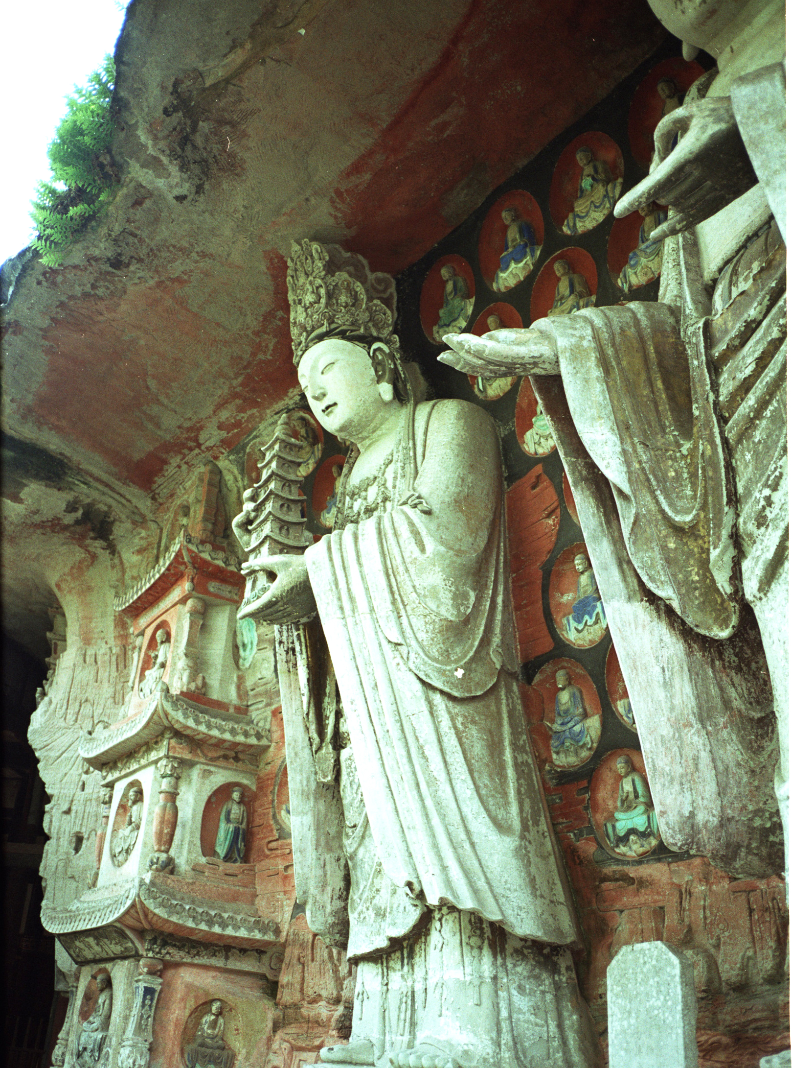 宝顶山石刻